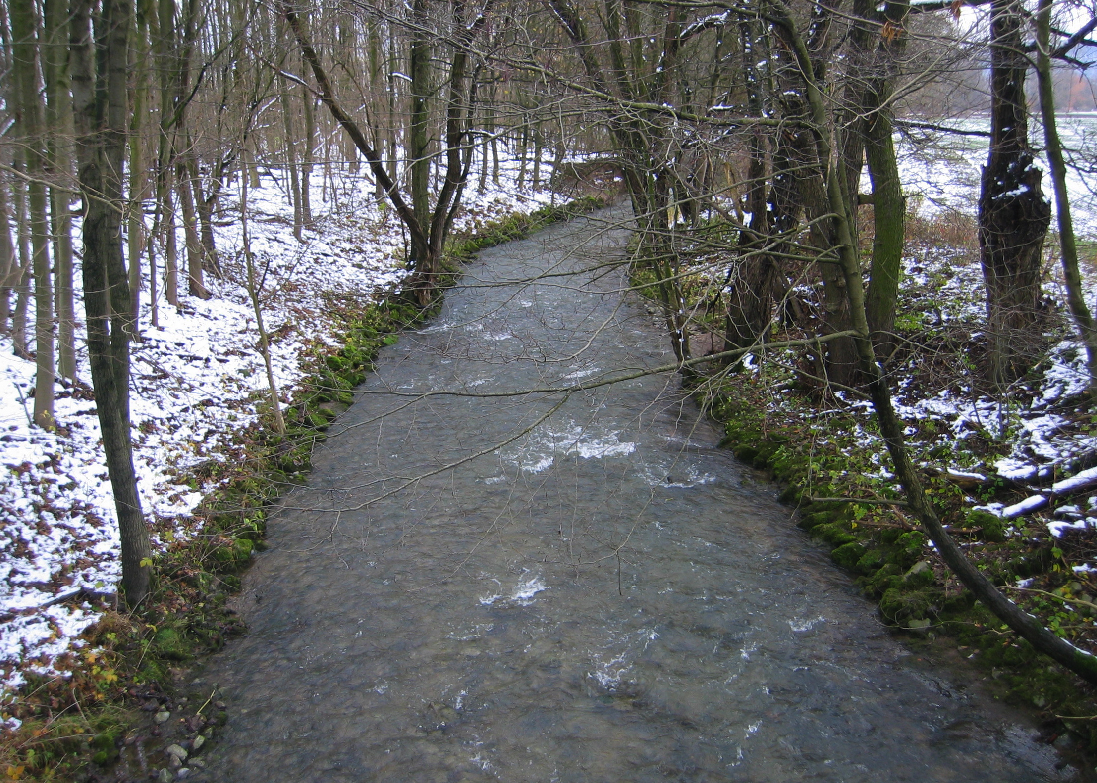 Die Aa bei Herste, Bad Driburg, Deutschland.